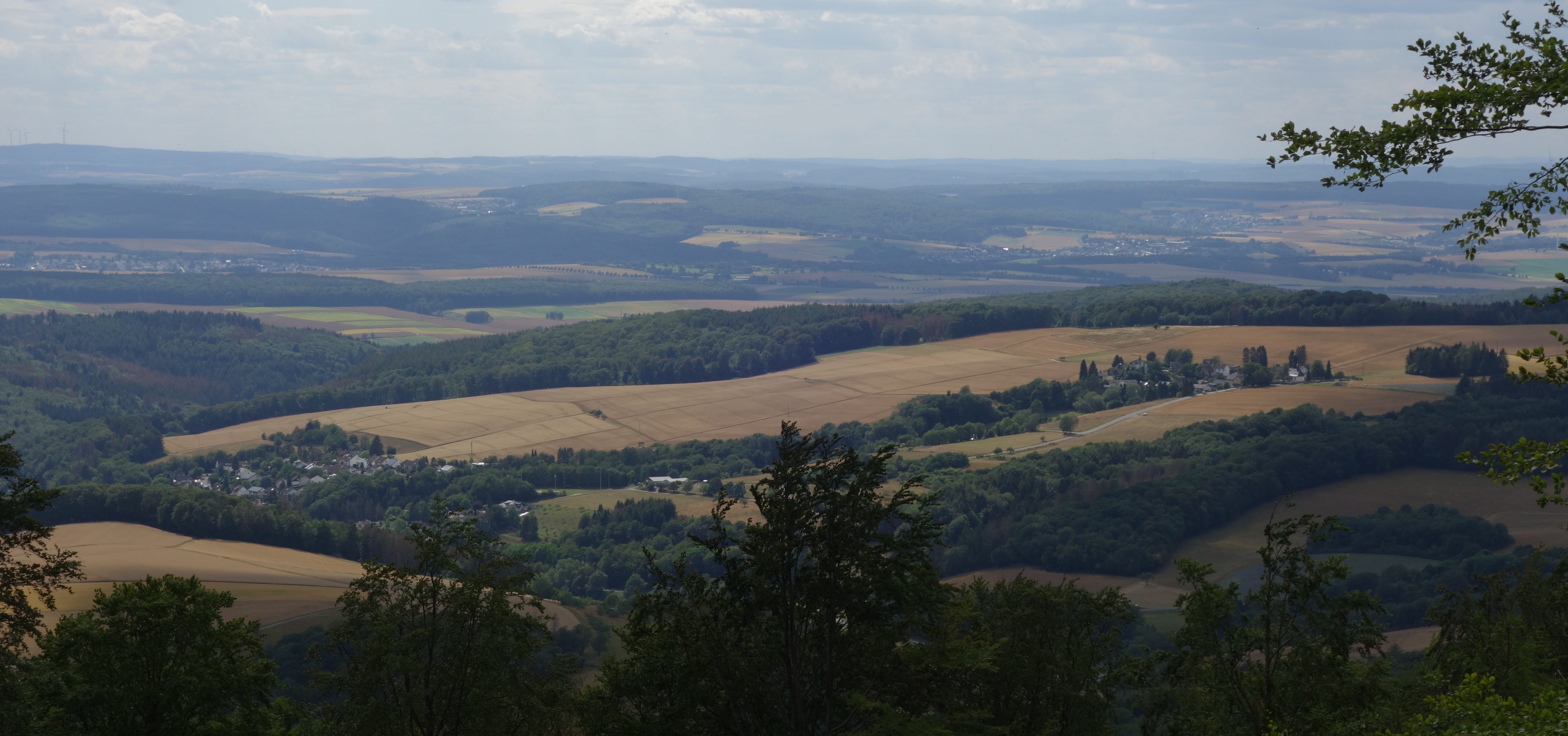 Niederems (links) und der Weiler Reinborn vom Windhain gesehen